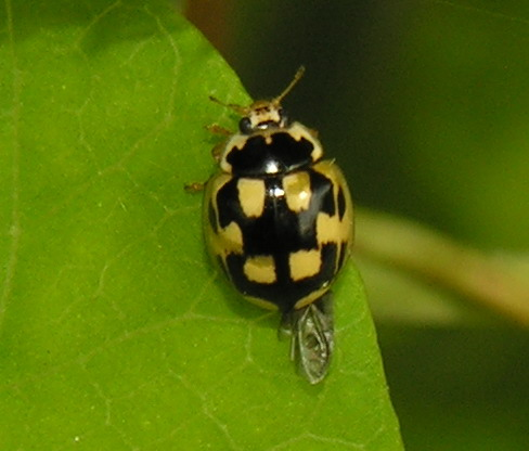 Juodasiūlė boružė (Propylaea quatuordecimpunctata) Šeima. Boružės (Coccinellidae) Foto: Algirdas, 2006 m. liepos 22 d., Lietuva